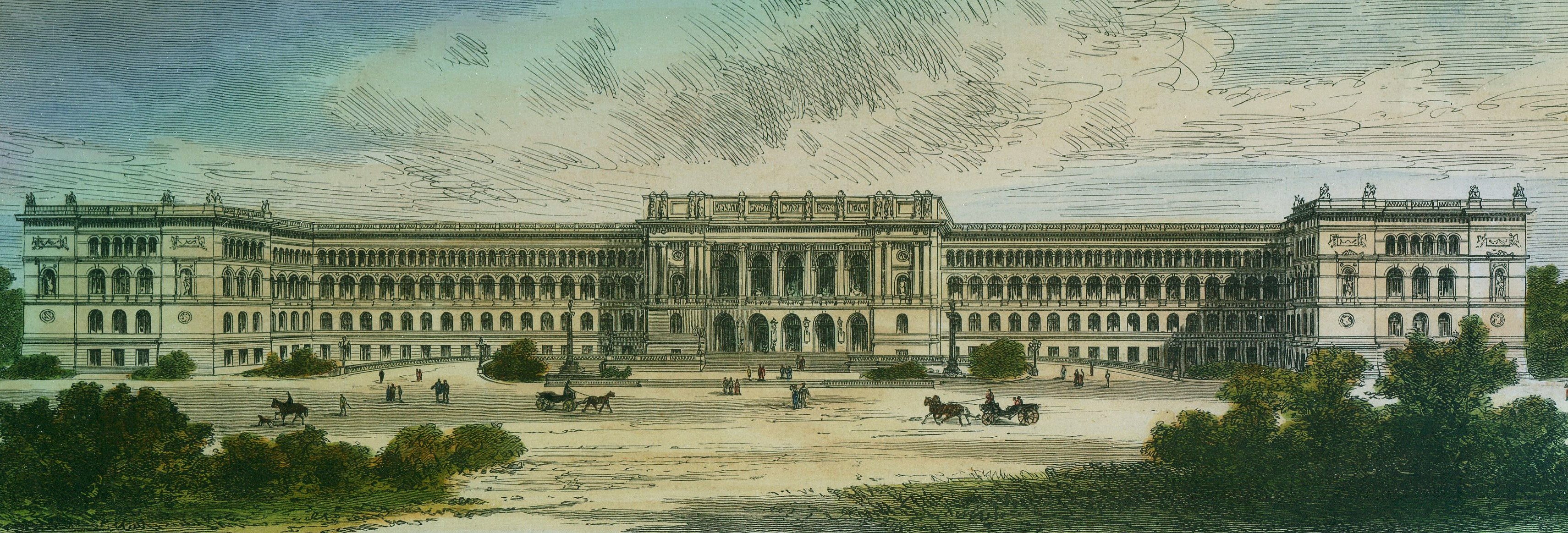 "Das neue Gebäude der Technischen Hochschule in Berlin"